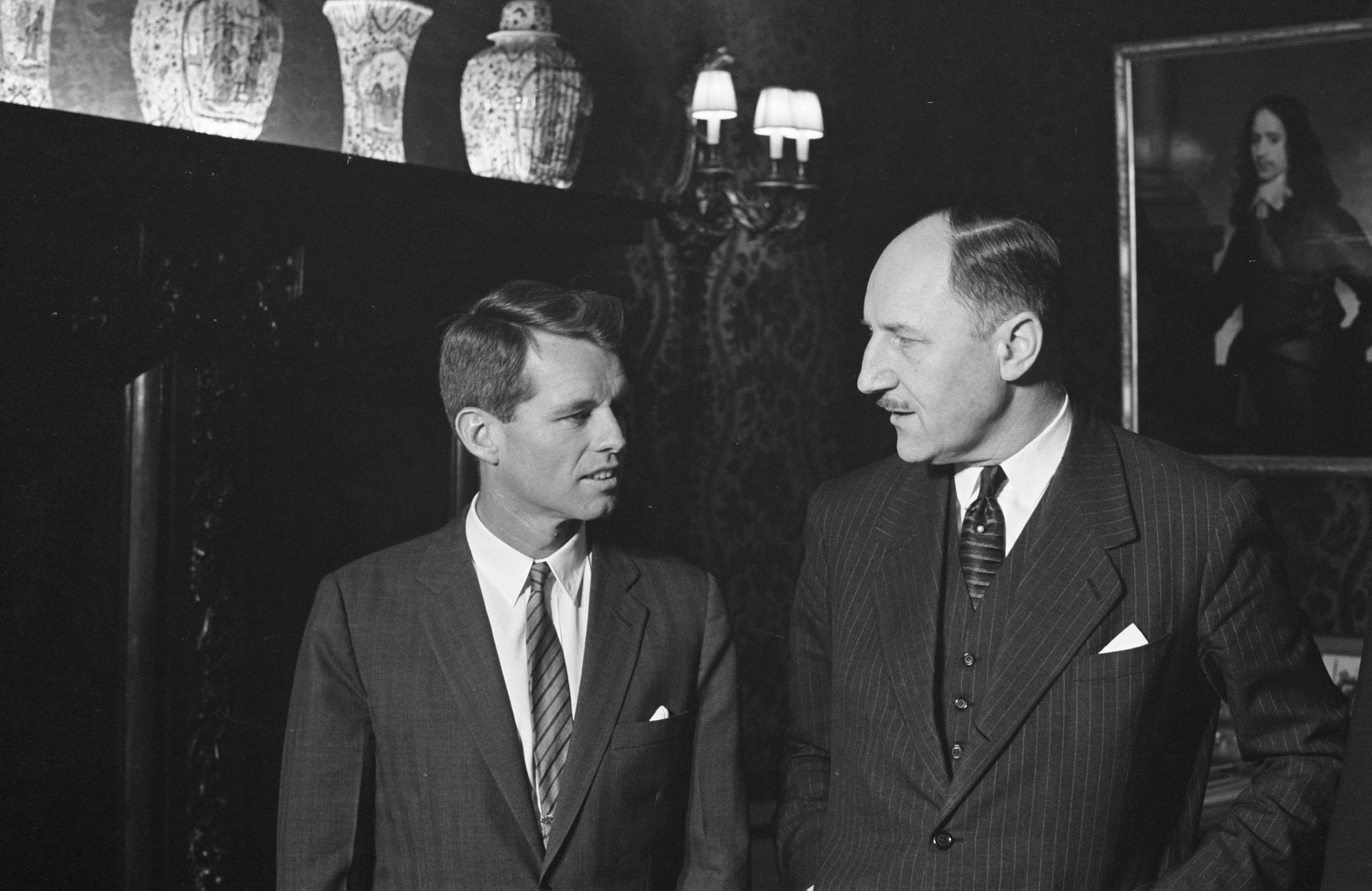 Collectie / Archief : Fotocollectie Anefo Reportage / Serie : [ onbekend ] Beschrijving : De Amerikaanse minister van Justitie, Robert Kennedy begroet door minister Luns (rechts) Datum : 26 februari 1962 Trefwoorden : ministers Persoonsnaam : Kennedy, Robert, Luns, J.A.M.H., Luns, Joseph Fotograaf : Rossem, Wim van / Anefo Auteursrechthebbende : Nationaal Archief Materiaalsoort : Negatief (zwart/wit) Nummer archiefinventaris : bekijk toegang 2.24.01.05 Bestanddeelnummer : 913-5665